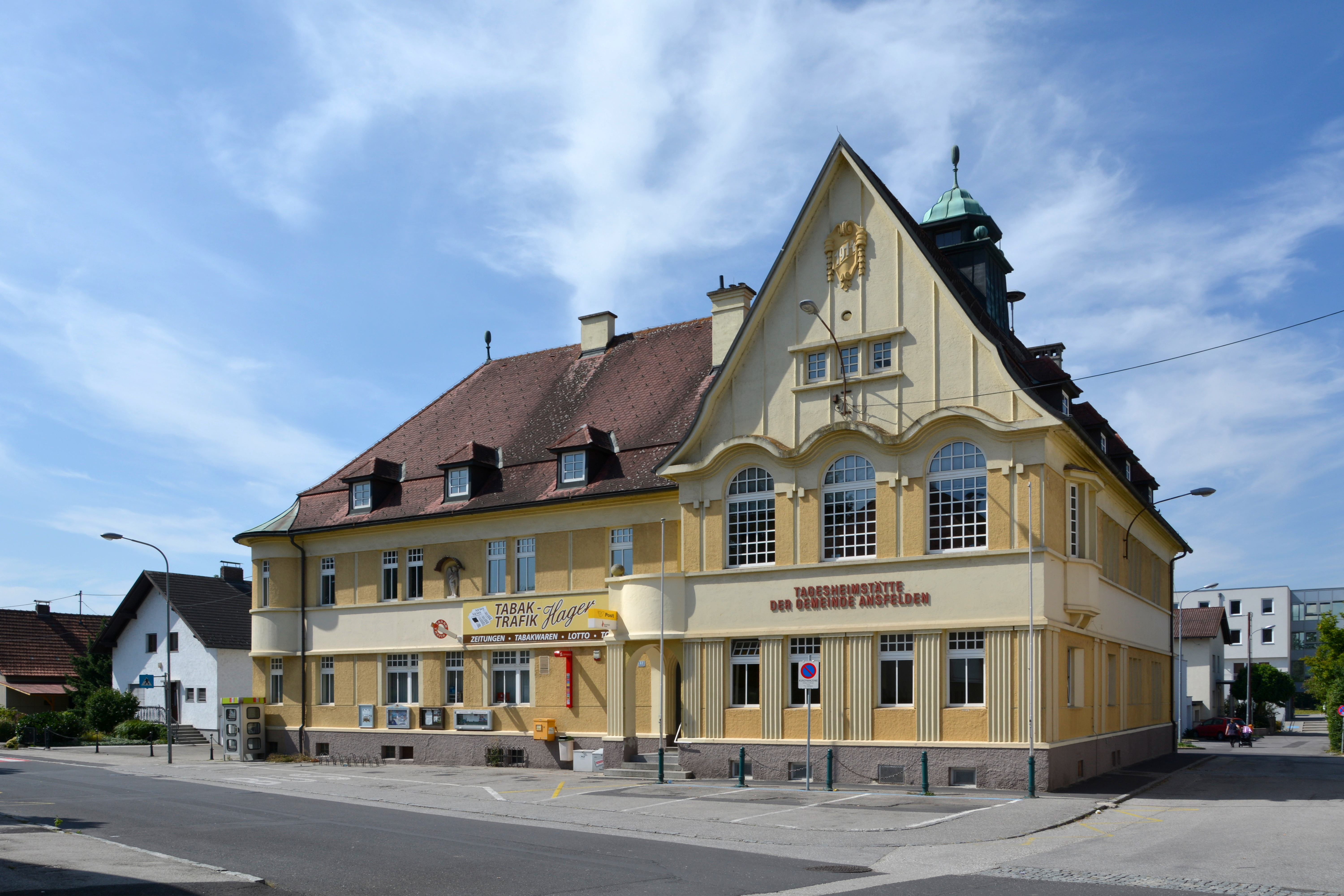 Post und Tagesheimstätte, ehemals Schule, Gemeindeamt